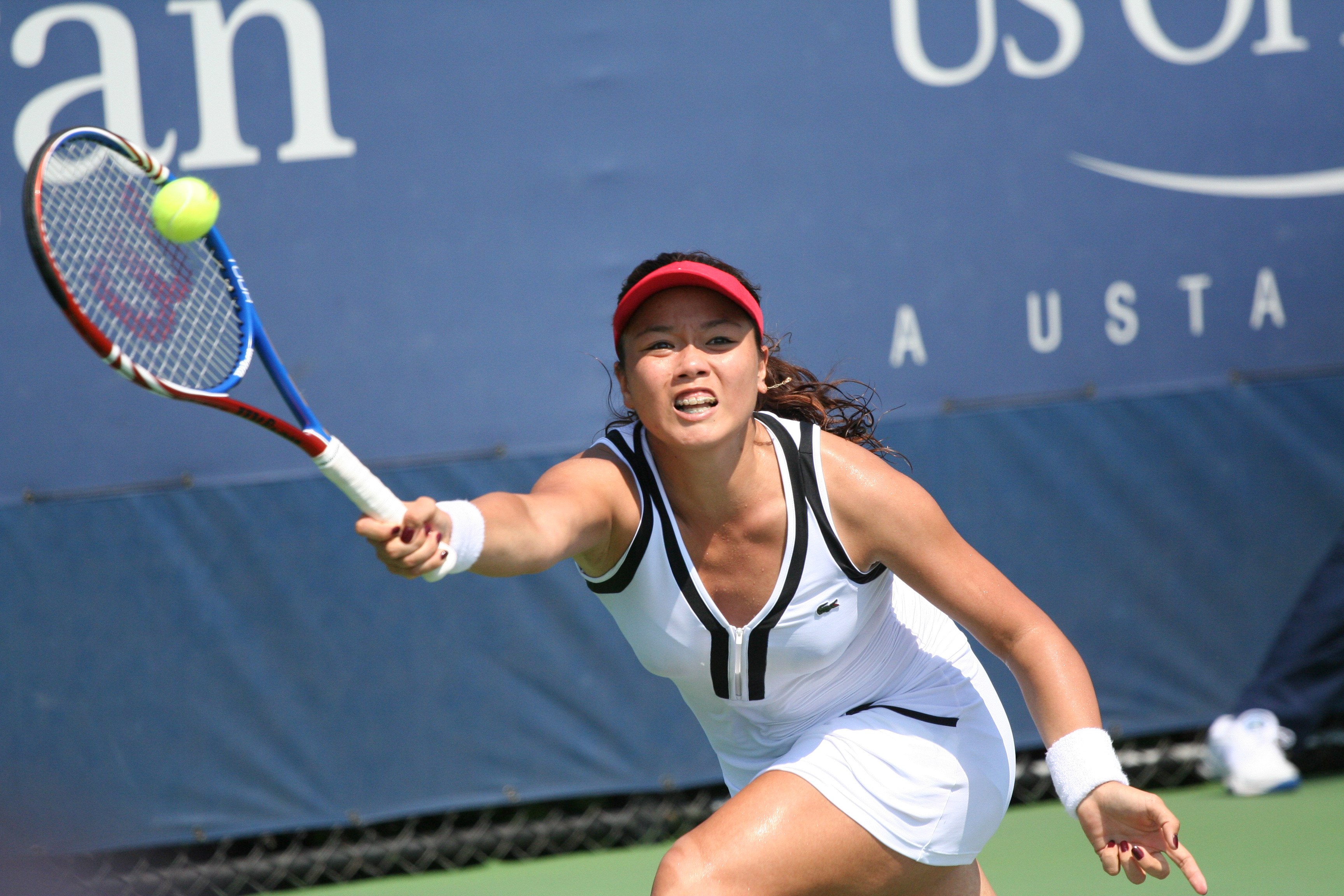 Chan Yung-jan at the U.S. Open, Sept. 2, 2010